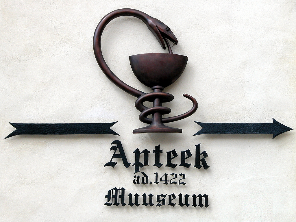 Tallinner Ratsapotheke von 1422, heute ein Museum.